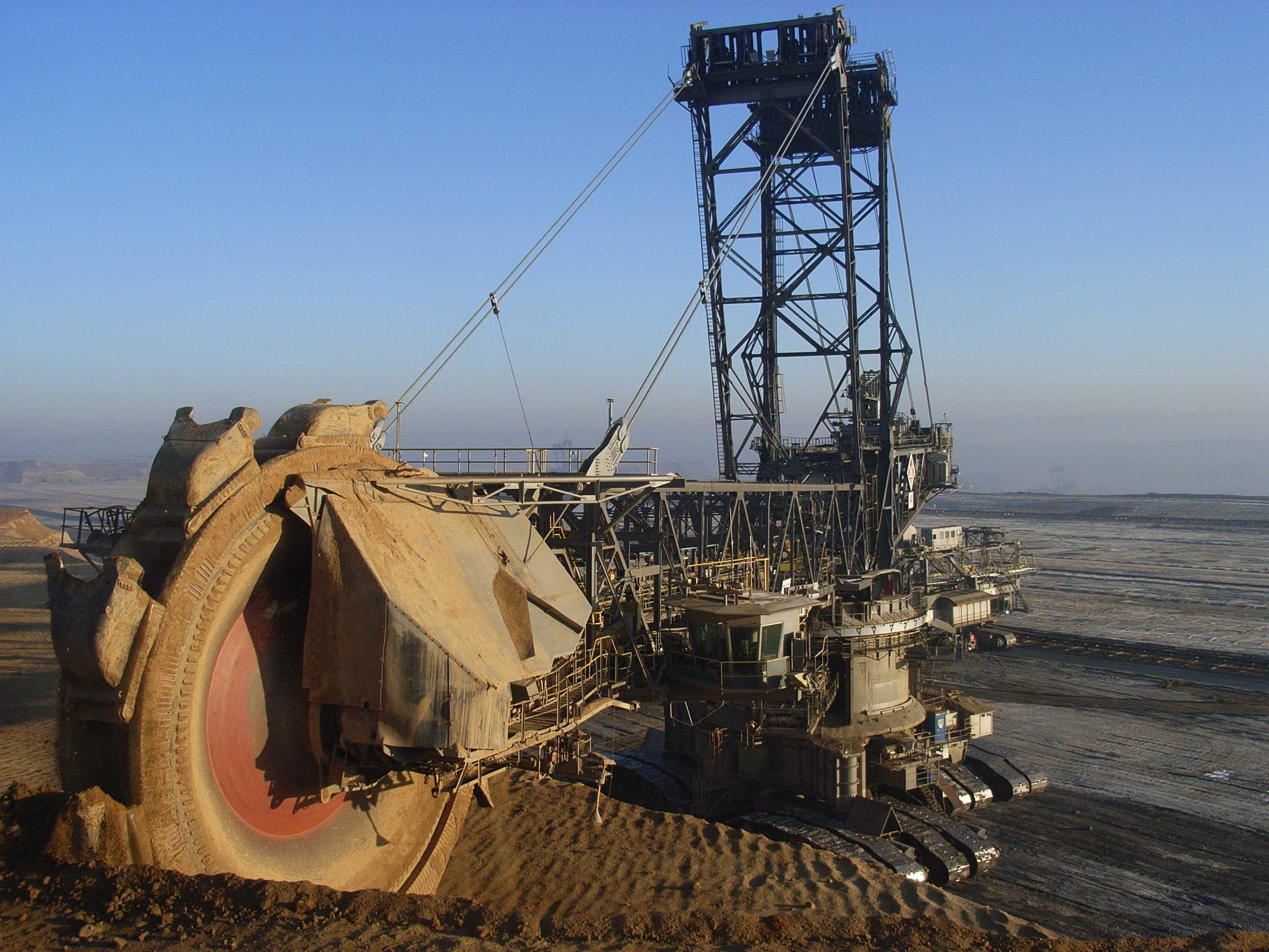 Schaufelradbagger Garzweiler II bei Spenrath (NRW)